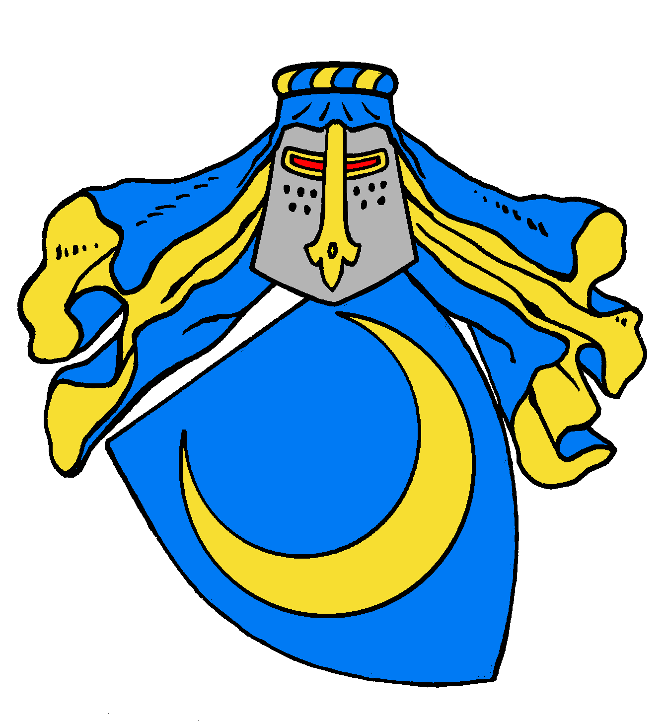 Wappen der von Wild, ein altes sächsisches Adelsgeschlecht, das allerdings auch in Teilen Frankens vertreten war: „Das Wappen der von Wild zeigt einen goldenen Halbmond in blauem Feld.“